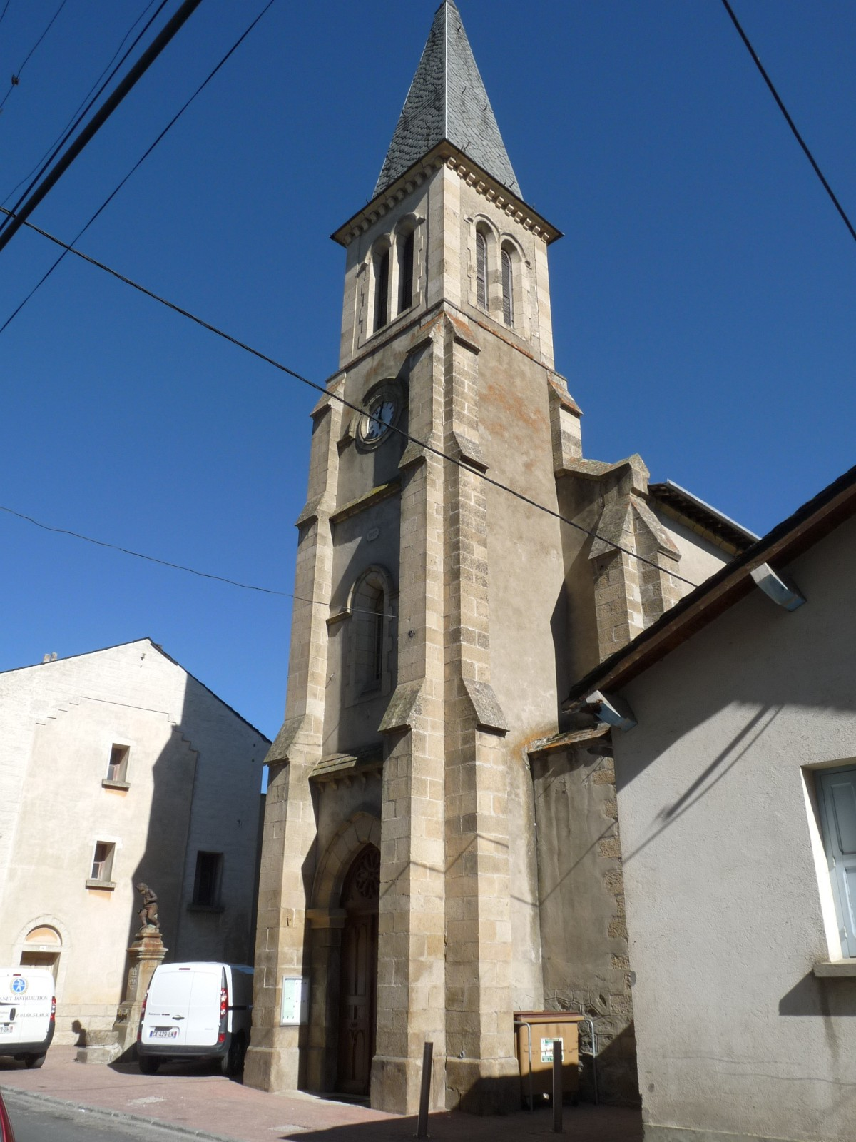 Eglise de La Cabanasse, Pyrénées-Orientales, France